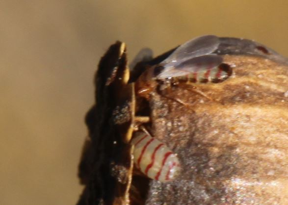 Brachyplax tenuis an einer Fruchtkapsel vom Klatschmohn, am 6. Juli 2018 an der Côte d’Azur